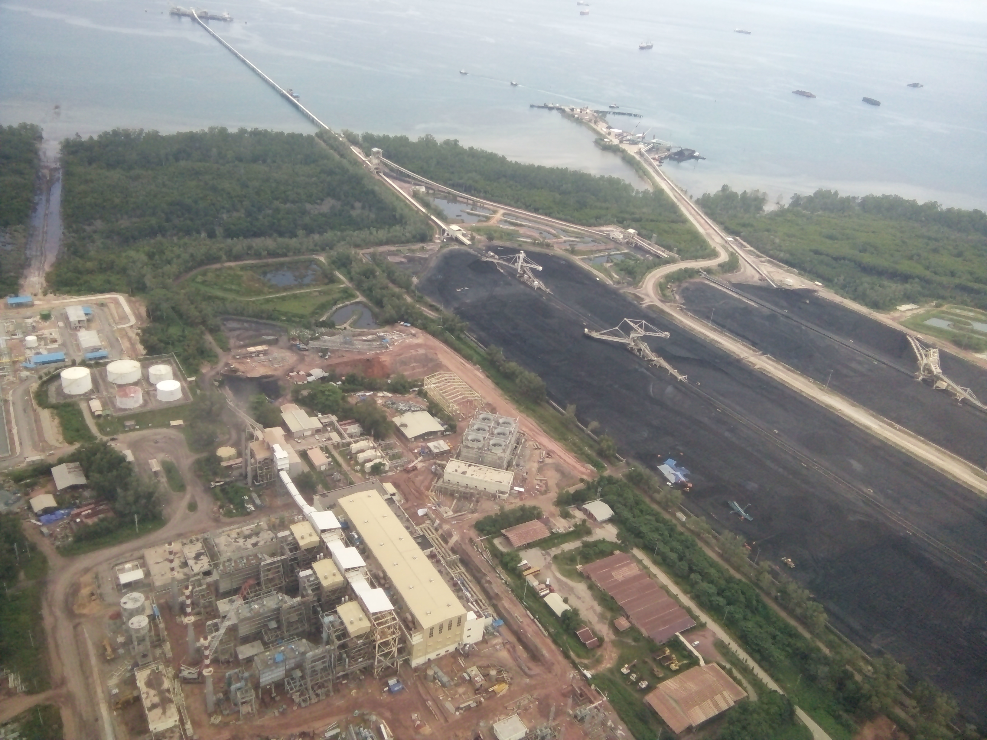 East Kutai, East Kalimantan